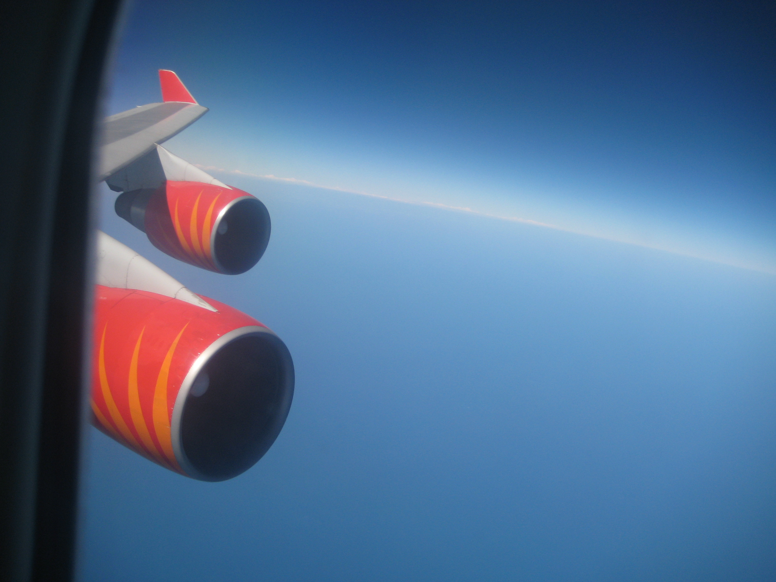 ദ്രവങ്ങളിലടങ്ങിയിരിക്കുന്ന ഊർജ്ജത്തെ യാന്ത്രിക ഊർജ്ജമാക്കി മാറ്റാൻ ഉപയോഗിക്കുന്ന ഒരു ഉപാധിയാണ് ടർബൈൻ (Turbine). ചുറ്റുന്ന എന്നർത്ഥമുള്ള ടർബൊ എന്ന ലാറ്റിൻ പദത്തിൽ നിന്നാണ് ടർബൈൻ (ചുറ്റുന്ന വസ്തു) എന്ന പേര് ഉത്ഭവിച്ചത്. ടർബൈൻ വ്യൂഹത്തിലൂടെയുള്ള ദ്രവ പ്രവാഹം വ്യൂഹത്തിലെ റോട്ടറിൽ ഘടിപ്പിച്ചിട്ടുള്ള ബ്ലേഡ് അഥവാ ദലങ്ങളെ ചലിപ്പിച്ച് റോട്ടറെ കറക്കുന്നു. ടർബൈനിലുപയോഗിക്കുന്ന മാധ്യമത്തെ അടിസ്ഥാനമാക്കി ടർബൈനുകളെ ജല ടർബൈൻ, നീരാവി ടർബൈൻ, വാതക ടർബൈൻ, കാറ്റ് (wind) ടർബൈൻ എന്നിങ്ങനെ നാലായി തരംതിരിക്കാം. ജല ടർബൈൻ പ്രധാനമായും വൈദ്യുതിയുടെ ഉത്പ്പാദനത്തിനായി ഉപയോഗിക്കുന്നു. എങ്കിലും വൈദ്യുതിയുടെ മുഖ്യ ഉത്പ്പാദനം നീരാവി ടർബൈനുകളുടെ പ്രവർത്തനത്തിൽ കൂടിയാണ്. വൈദ്യുതോത്പ്പാദനം, വ്യവസായ ആവശ്യങ്ങൾ, സമുദ്രത്തിൽ ക്കൂടി സഞ്ചരിക്കുന്ന വലിയ വാഹനങ്ങളുടെ നോദനം എന്നിവയ്ക്കായി നീരാവി ടർബൈനുകൾ ഉപയോഗിക്കുന്നു. ജെറ്റ് നോദനം മൂലം പ്രവർത്തിക്കുന്ന വിമാനങ്ങളിലാണ് വാതക ടർബൈനുകൾ പ്രധാനമായും ഉപയോഗിക്കുന്നത്. ഇതുകൂടാതെ, വൈദ്യുതോത്പ്പാദന രംഗത്ത്, പീക്ക് ലോഡ് ആവശ്യങ്ങളെ (peak load demands) നേരിടുന്നതിനും, പ്രകൃതി വാതക വ്യവസായ മേഖലയിൽ വളരെ നീളം കൂടിയ പൈപ്പുകളിൽക്കൂടി പ്രകൃതി വാതകം പമ്പു ചെയ്യുന്നതിനും, വാതക ടർബൈനുകൾ ഉപയോഗപ്പെടുത്താറുണ്ട്. വൈദ്യുതോത്പ്പാദനത്തിന് കാറ്റിൽ നിന്നുള്ള ഊർജ്ജം വഴി പ്രവർത്തിക്കുന്ന കാറ്റ് ടർബൈനുകളും അടുത്തകാലത്തു രൂപപ്പെടുത്തിയിട്ടുണ്ട്. വീമാനത്തിൽ നിന്നുള്ള ടർബൈനിന്റെ ദൃശ്യമാണിവിടെ ചേർത്തിരിക്കുന്നത്.